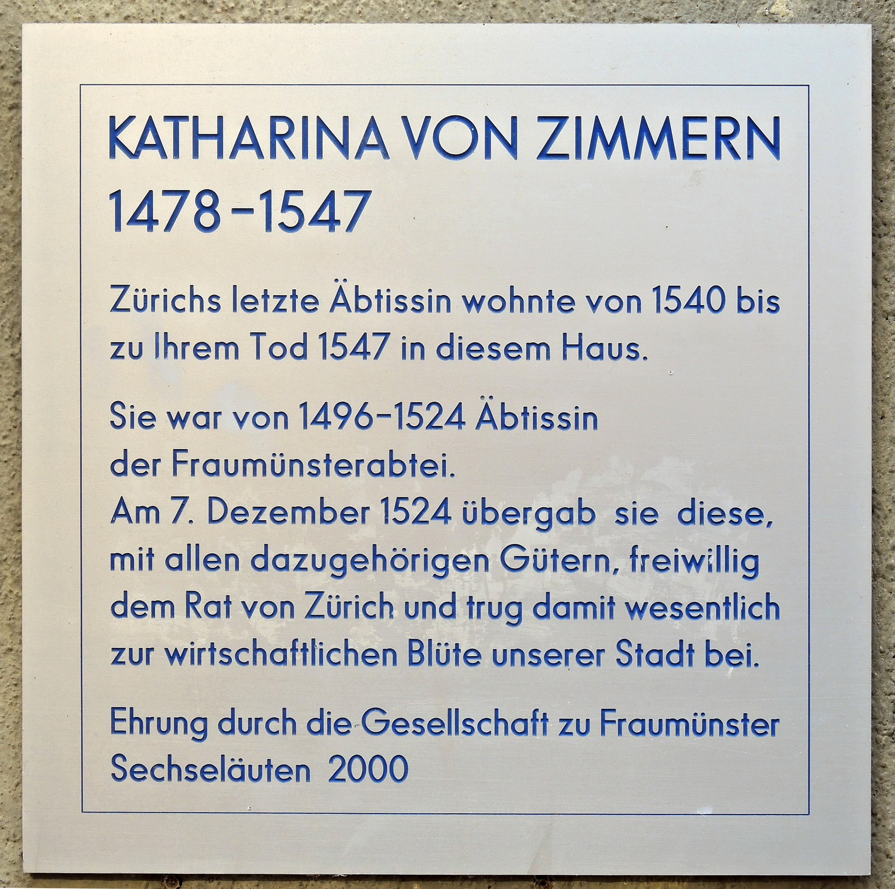 Katharina von Zimmern (1478-1547) : Haus «zum Mohrenkopf», Neumarkt 13 in Zürich (Switzerland)